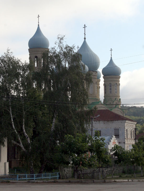 Церковь в селе Балтай Балтайского района Саратовской области